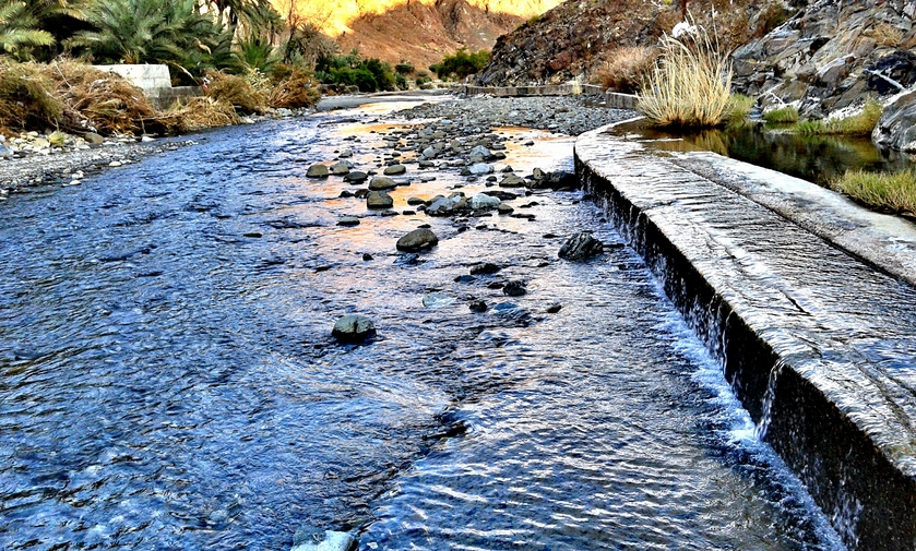 فلج المحدوث بلدة الوقبة بشمال ولاية ينقل سلطنة عمان